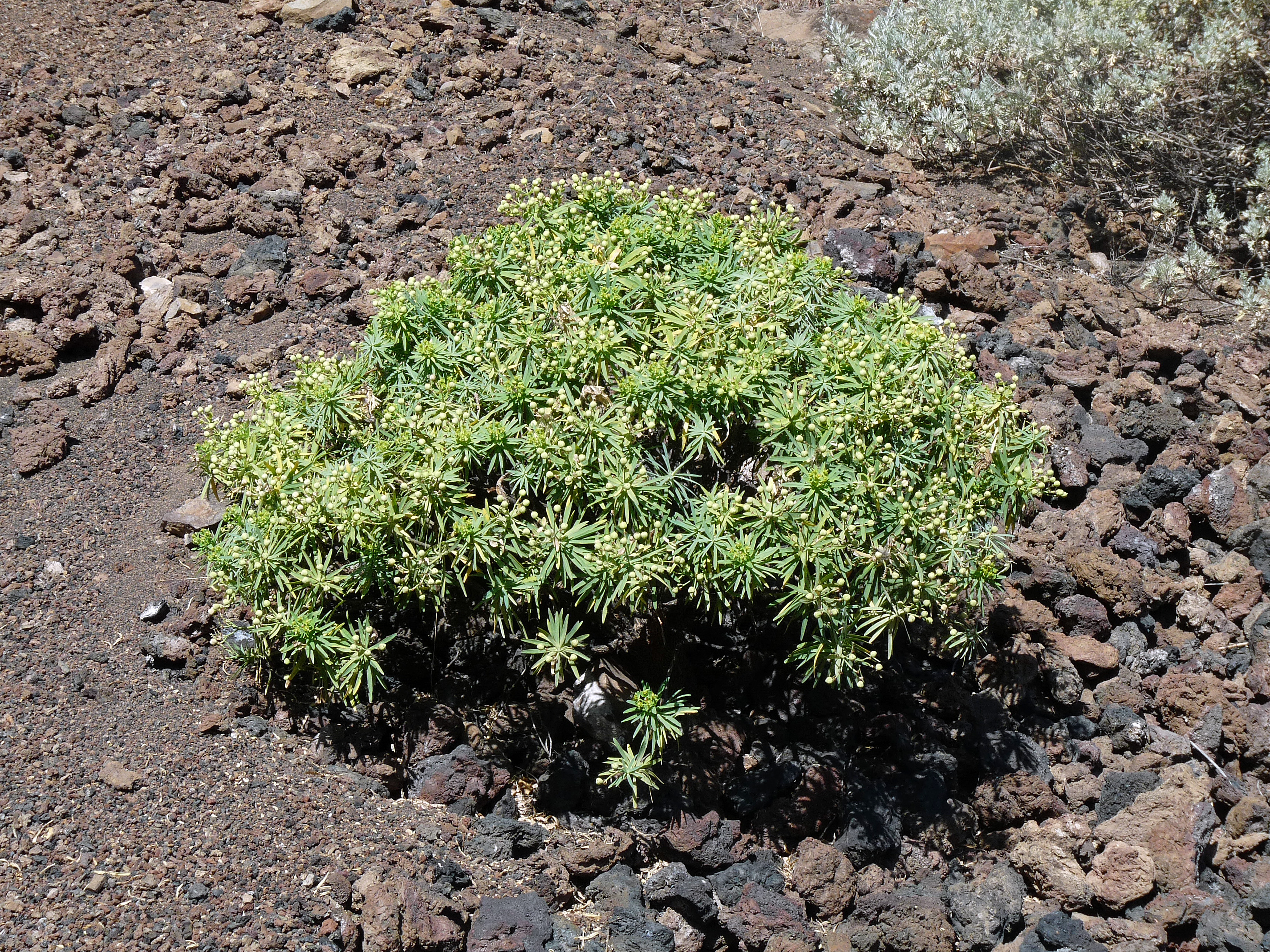 Chã das Caldeiras (île de Fogo, Cap-Vert) : Euphorbia tuckeyana, plante endémique